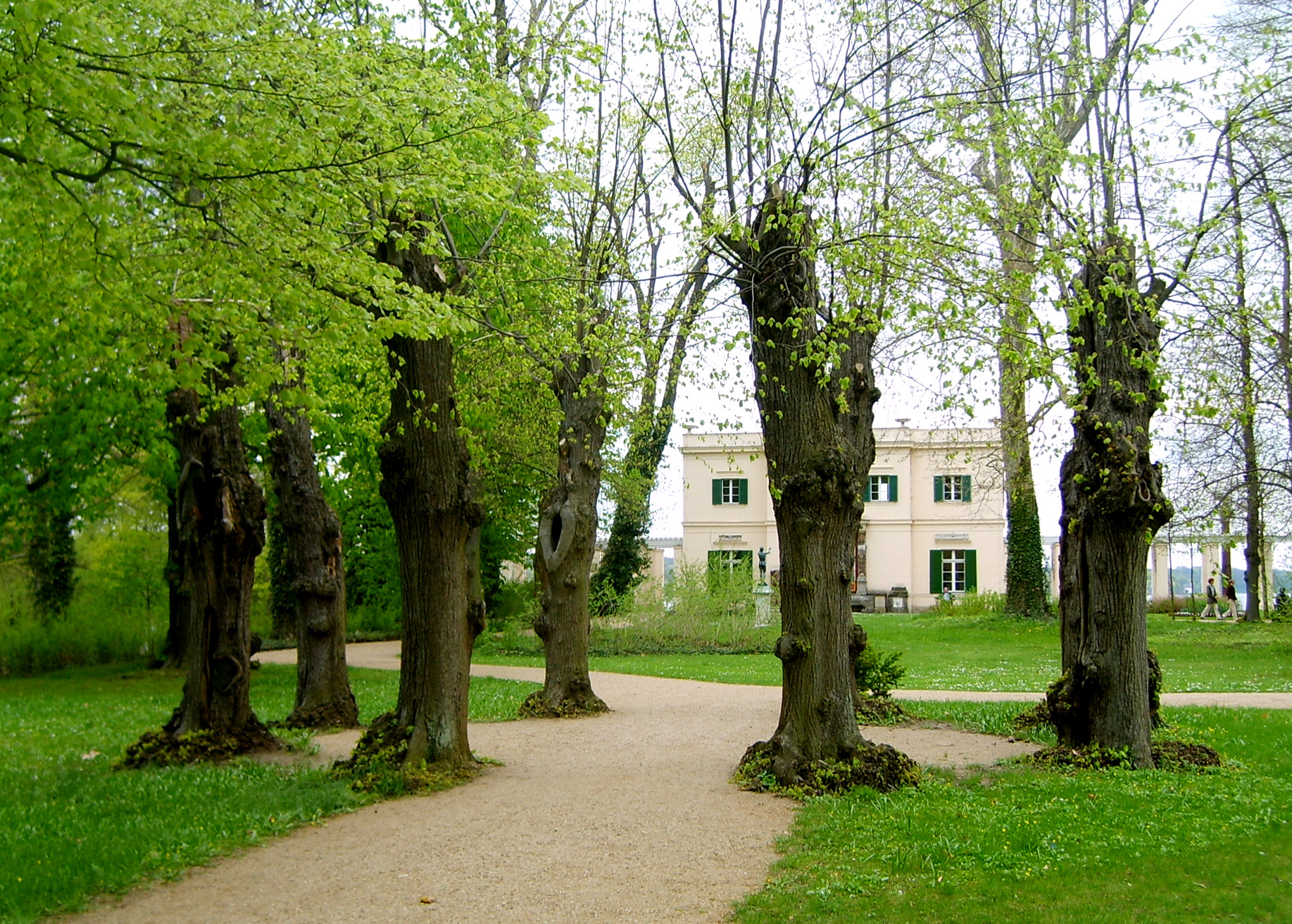 Lindenlaube und Casino, Glienicker Park, 1.5.2013